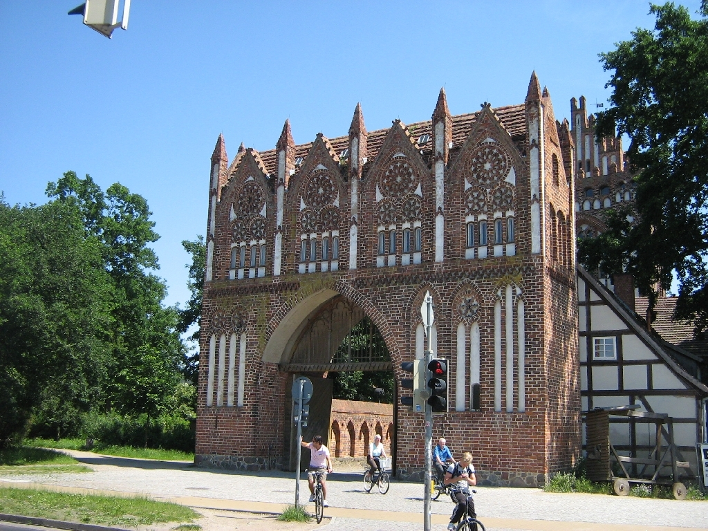 Das Treptower Tor in Neubrandenburg (Mecklenburg-Vorpommern, Germany). Das Treptower Tor ist das prächtigste Tor der norddeutschen Backsteingotik und beherbergt seit über 100 Jahren ein Museum